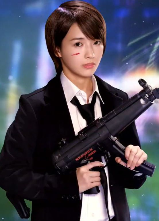 新宿スカウトバトル・プロモーションより切抜き